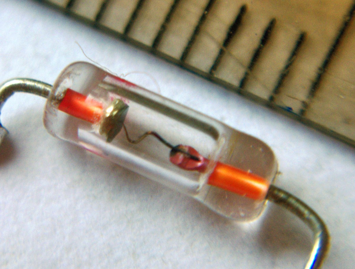 Electronic component - old germanium diode